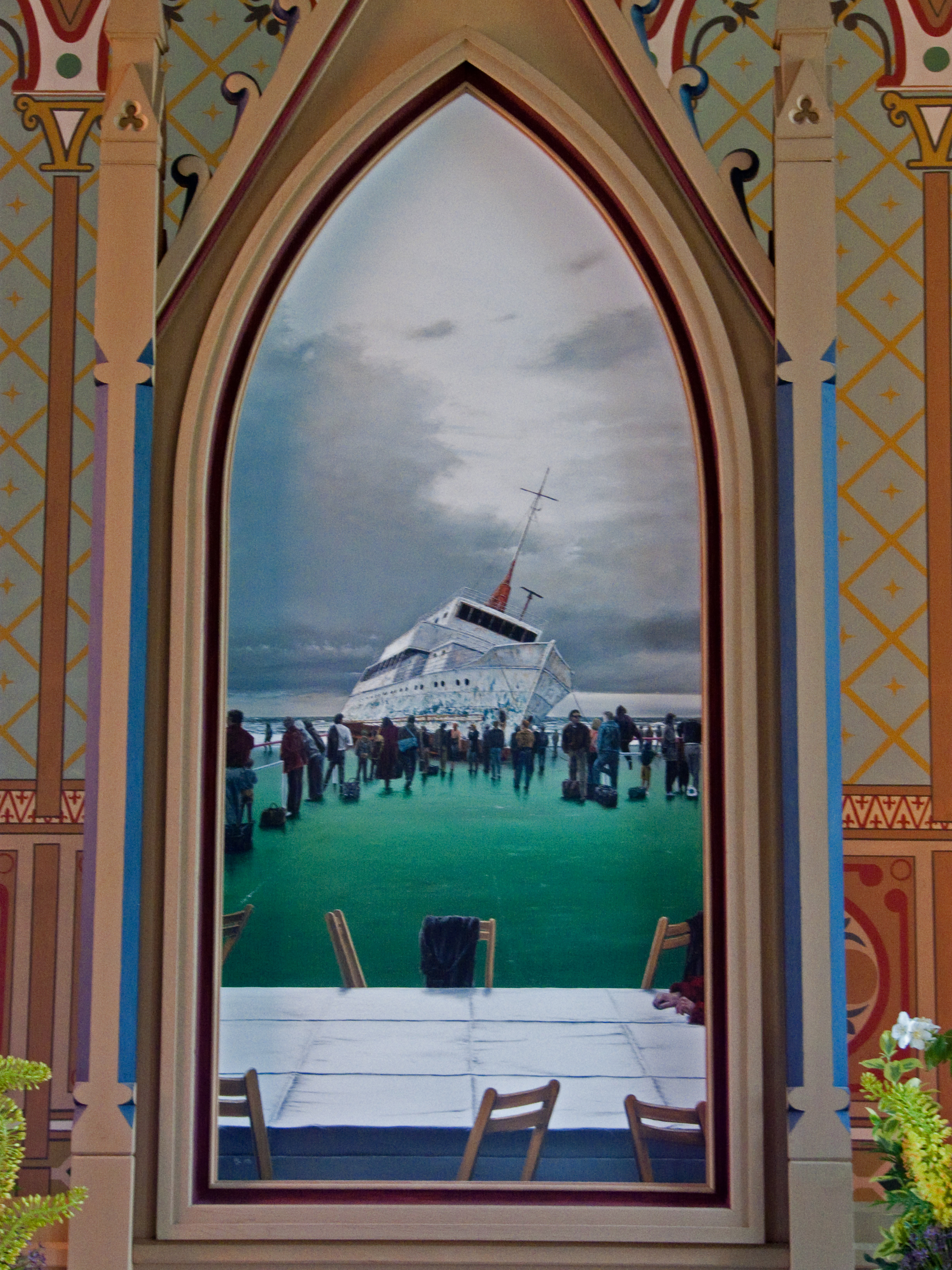 Altarbild von Hermann Buß (* 1951) in der Inselkirche Langeoog